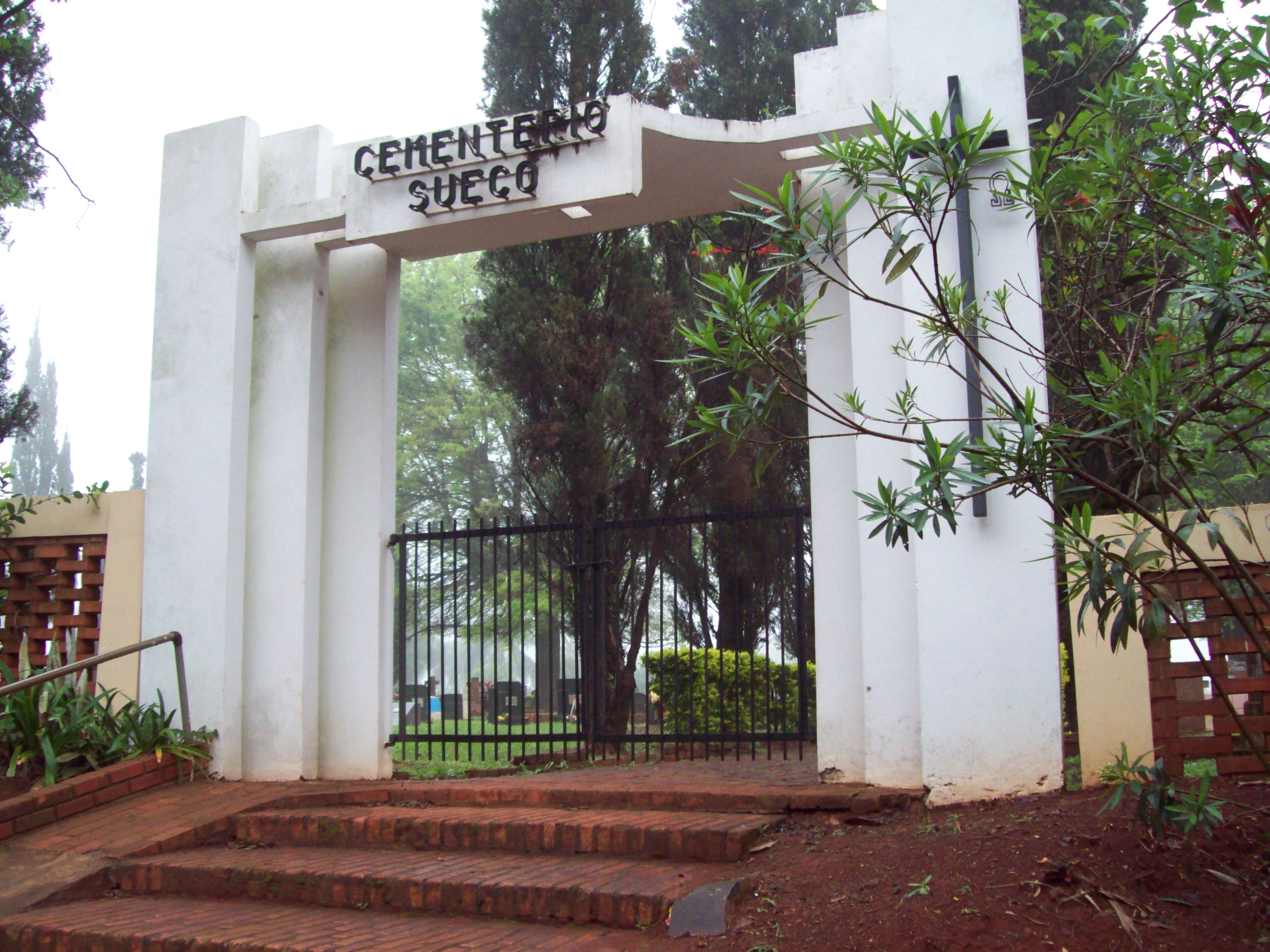 Cementerio Sueco de la Ciudad de Oberá